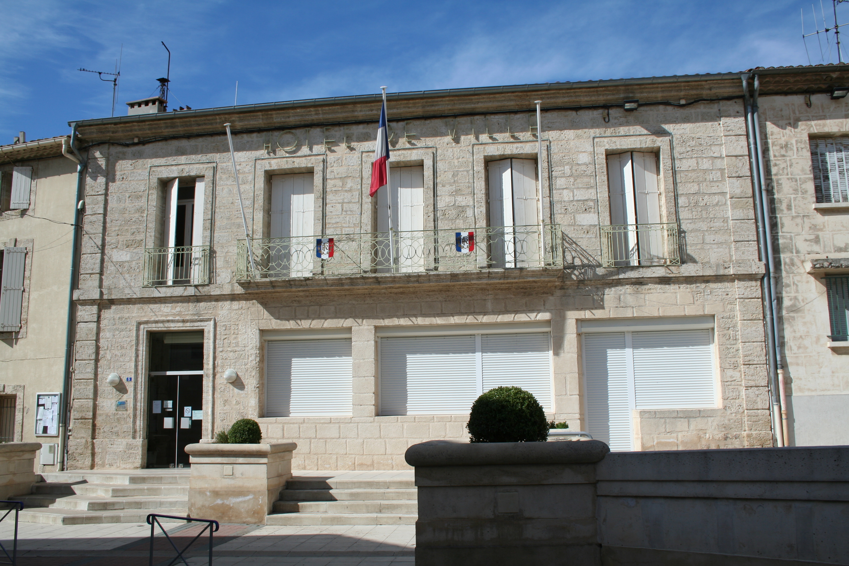 Montagnac (Hérault) - Mairie.